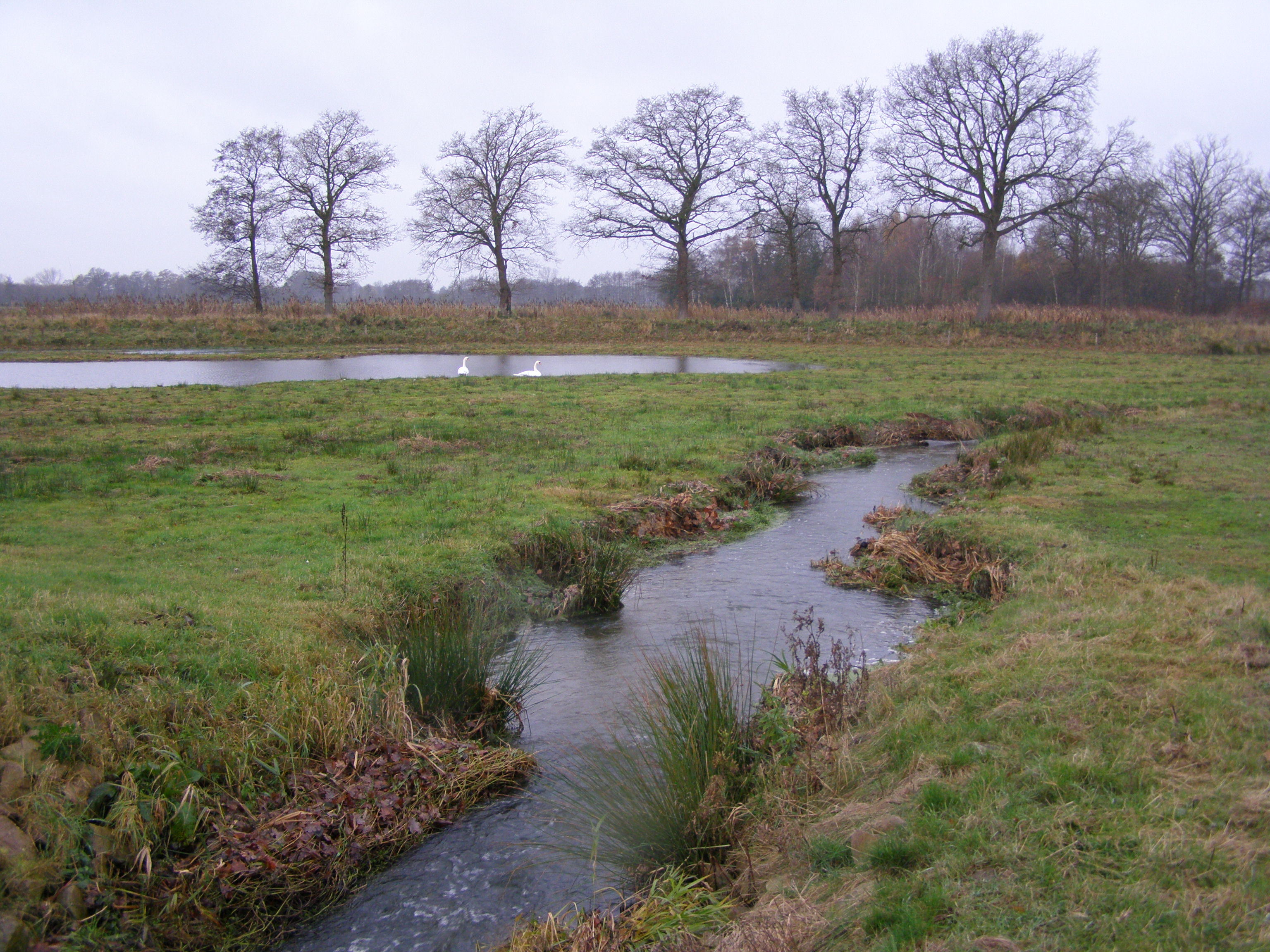 eigen werk. De nieuw gegraven beek in het retentiegebied Spikkersbeek.